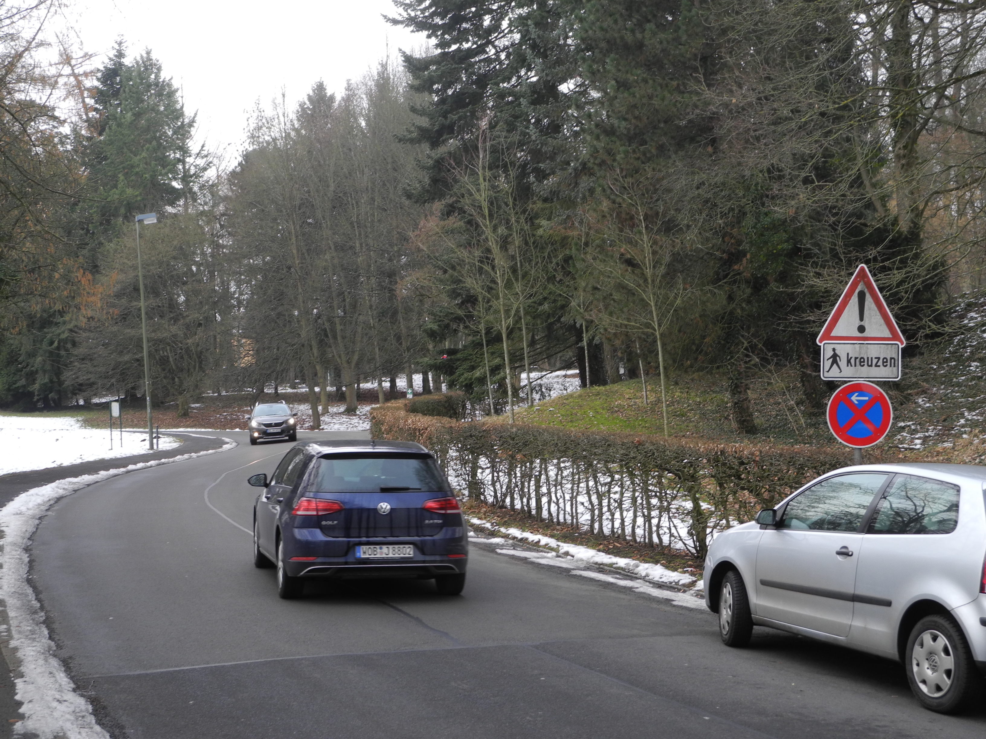 Die Mulangstraße im Bergpark Wilhelmshöhe in Kassel, Hessen, Deutschland. Straßenraum mit Kfz-Verkehr und Dauerparkplätzen (Habichtswald-Klinik). Warnzeichen kreuzende Fußgänger (Parkbesucher auf Parkwegen).